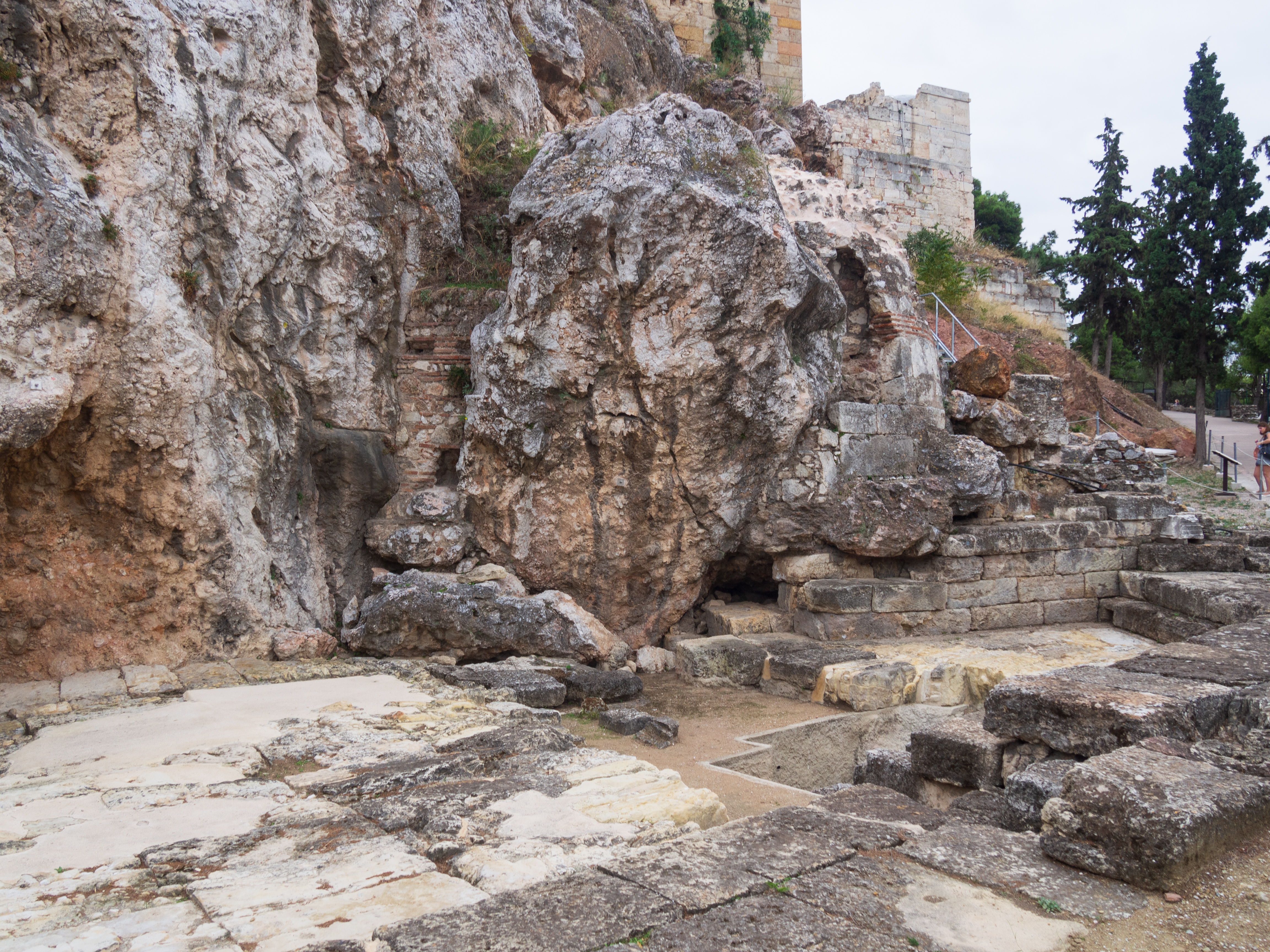 Σπήλαιο Κλεψύδρα«Σπήλαιο Κλεψύδρα»